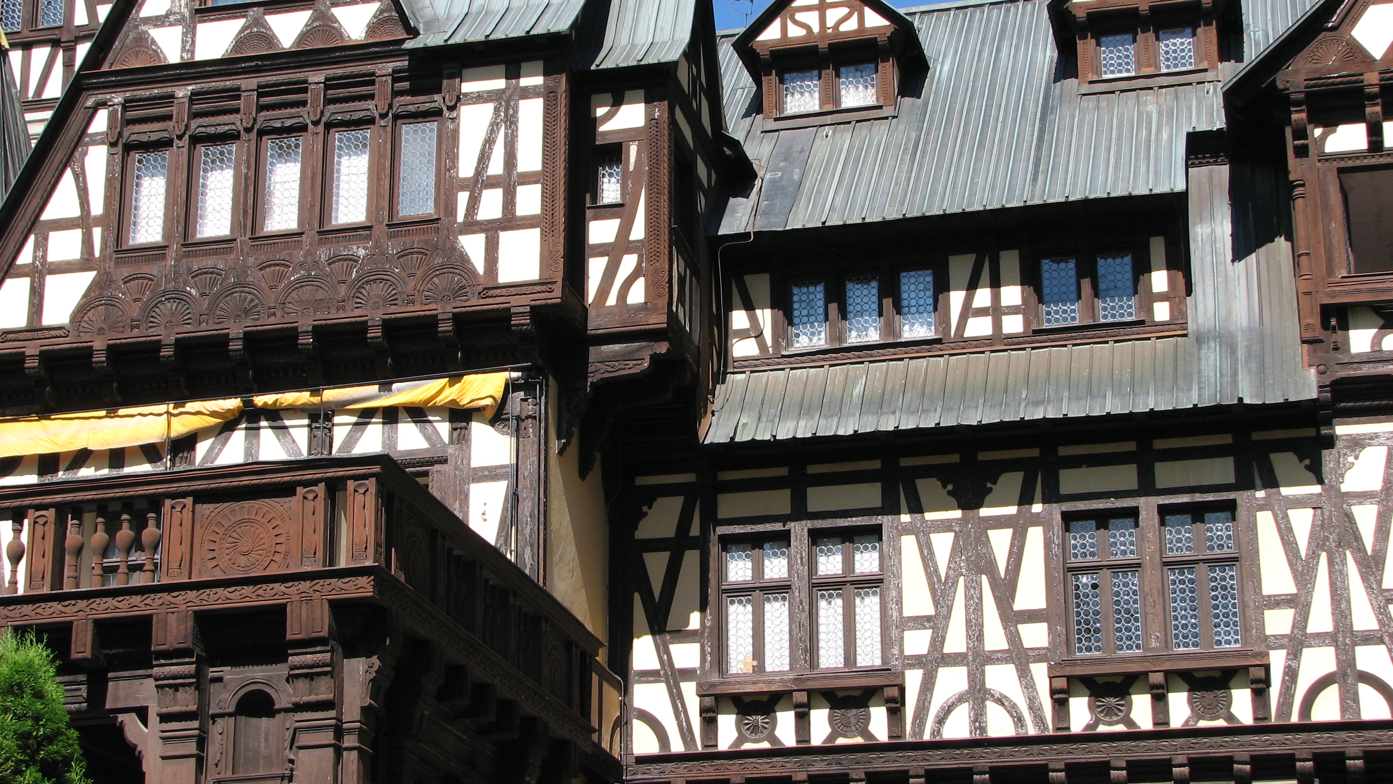 Pelisor Castle